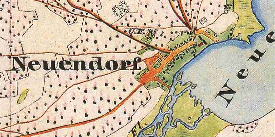 Neuendorf am See, Ortsteil der Gemeinde Unterspreewald, Lkr. Dahme-Spreewald, Brandenburg, Deutschland, Ausschnitt aus dem Urmesstischblatt 3849 Alt-Schadowvon 1846